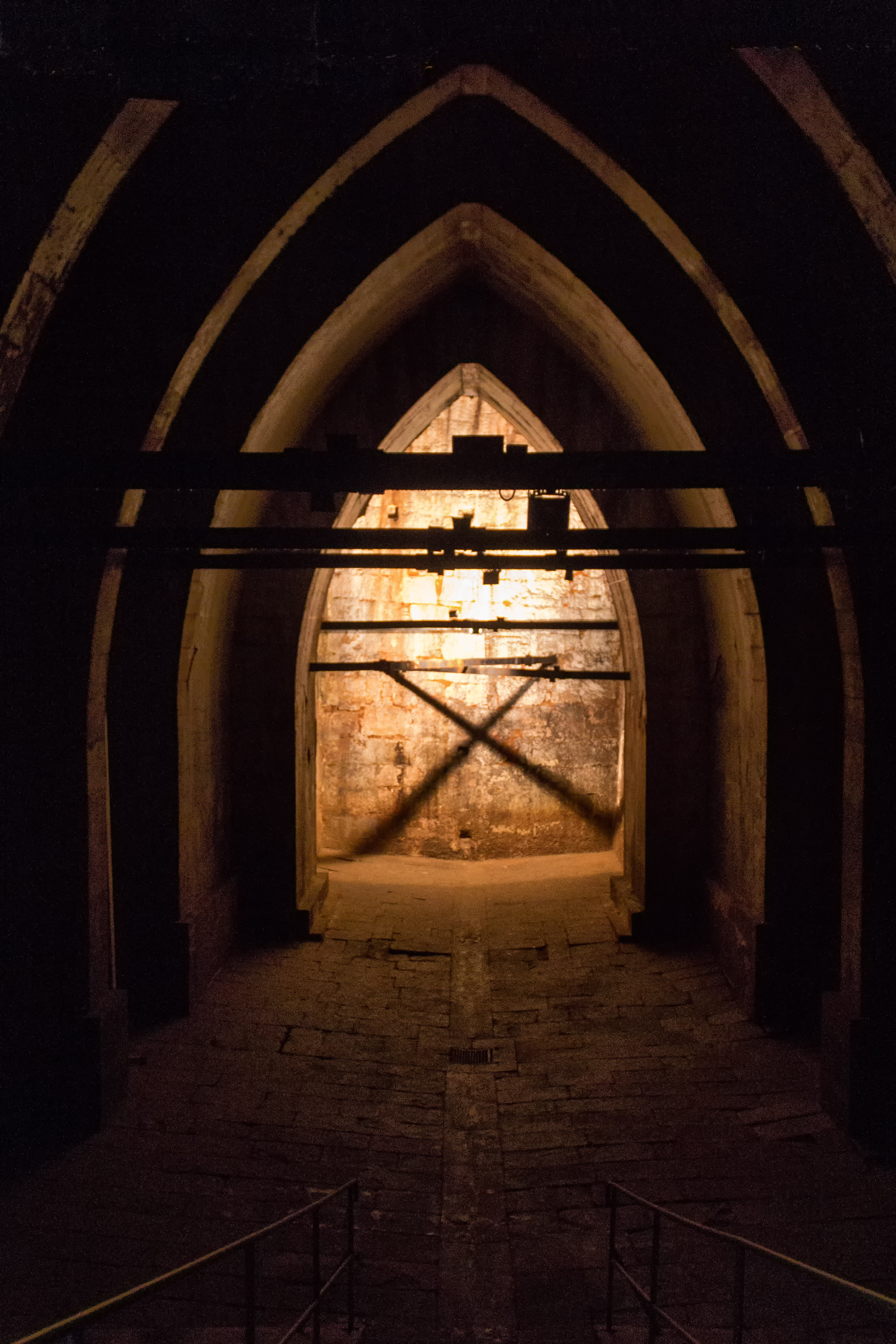 Ludwig-Donau-Main-Kanal, Schwarzach-Brückkanal, Südwiderlager innenThis is a photograph of an architectural monument.